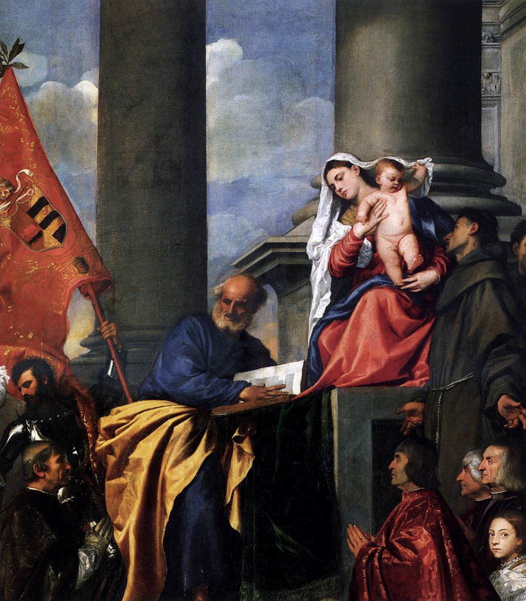 label QS:Lde,"links von Maria: Hl. Antonius von Padua, Familie Pesaro, rechts von Maria: Hl. Petrus und kniendem Stifter, Bischof Jacopo Pesaro und Soldat mit gefangenen Türken und Fahne des Bischofs"